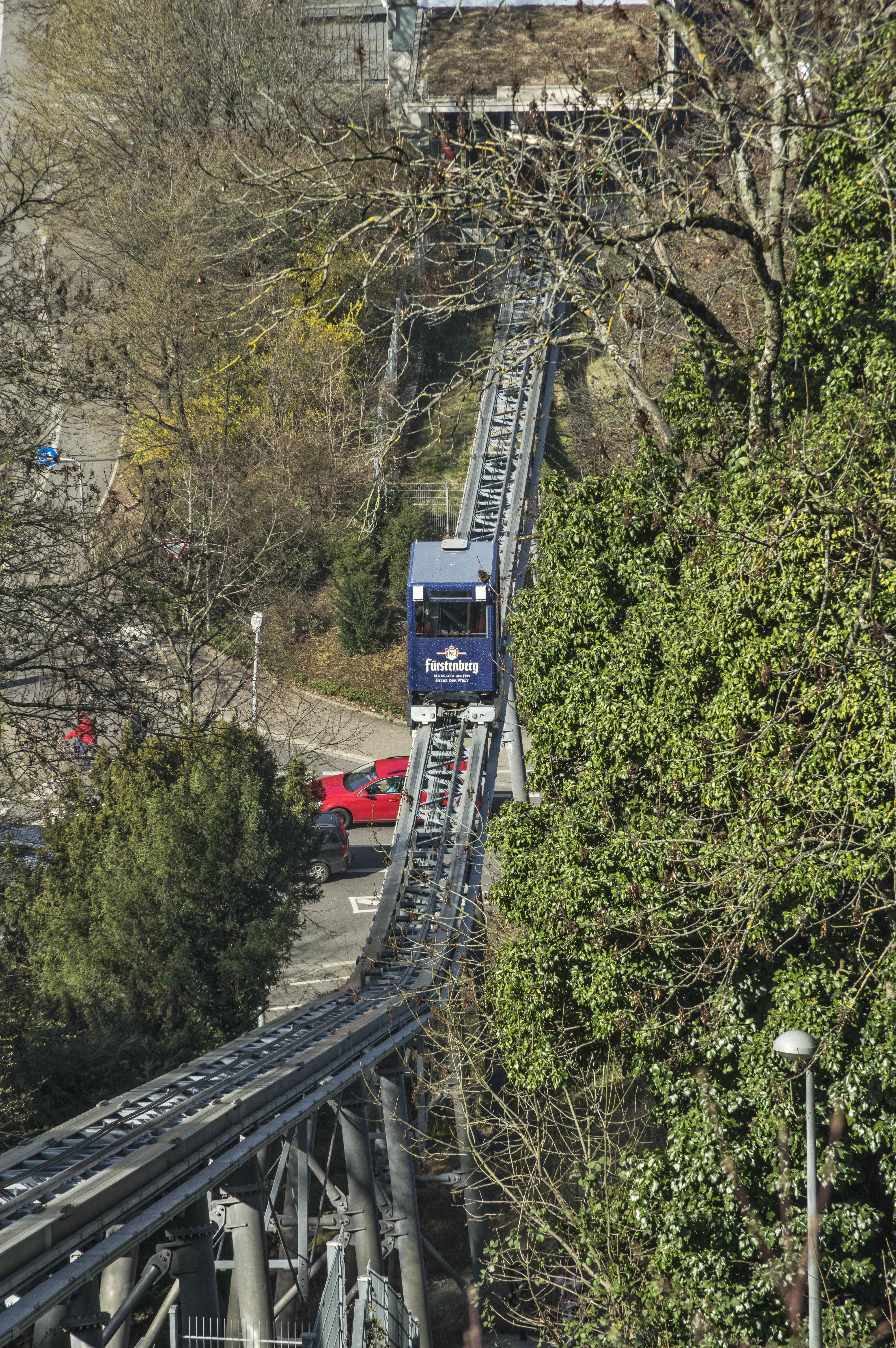 Bilder aus Freiburg Schloßbergbahn zum Restaurant Dattler